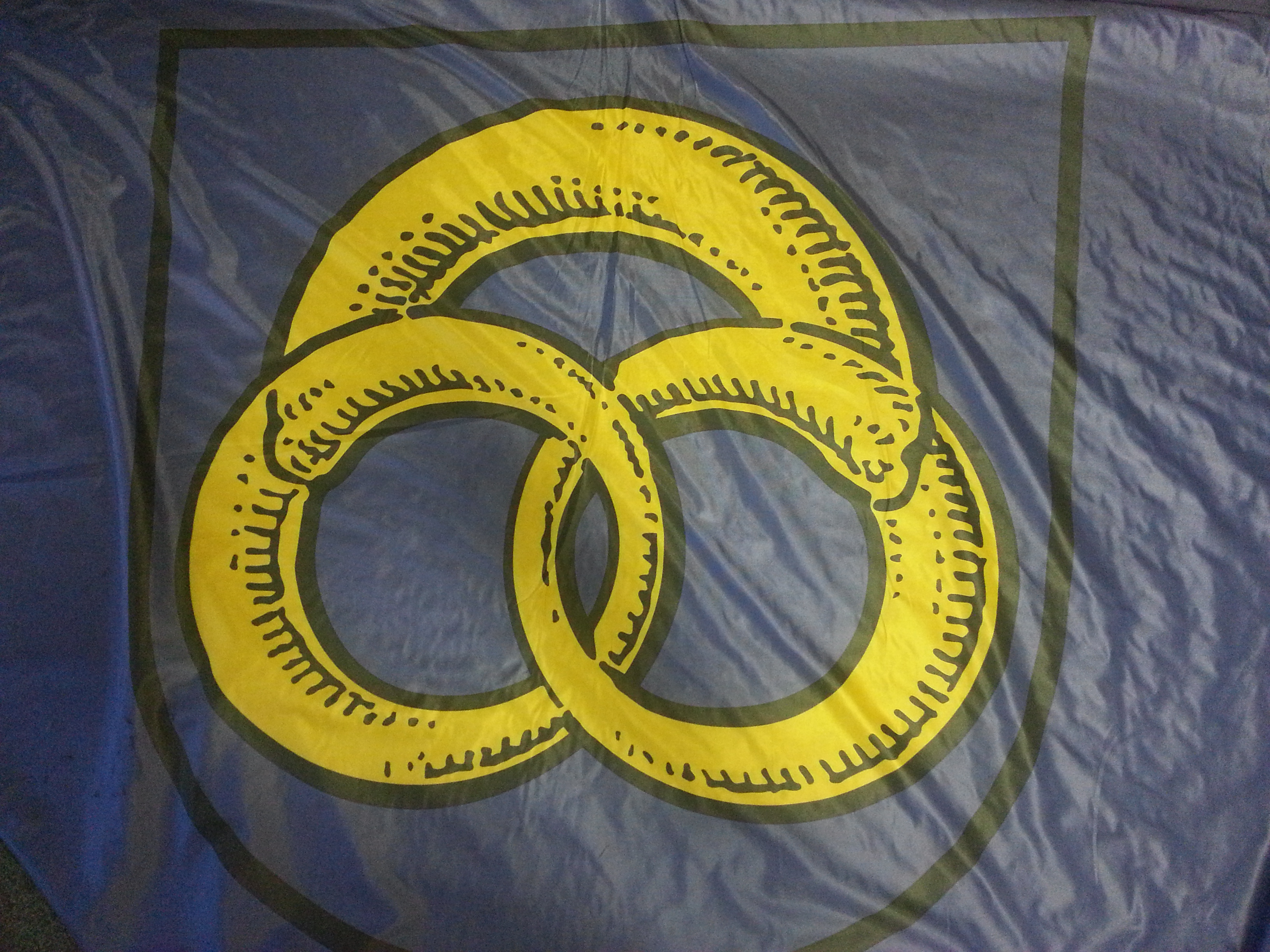 Protokoll